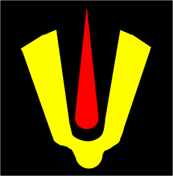 వెంకటేశ్వర నామాలు